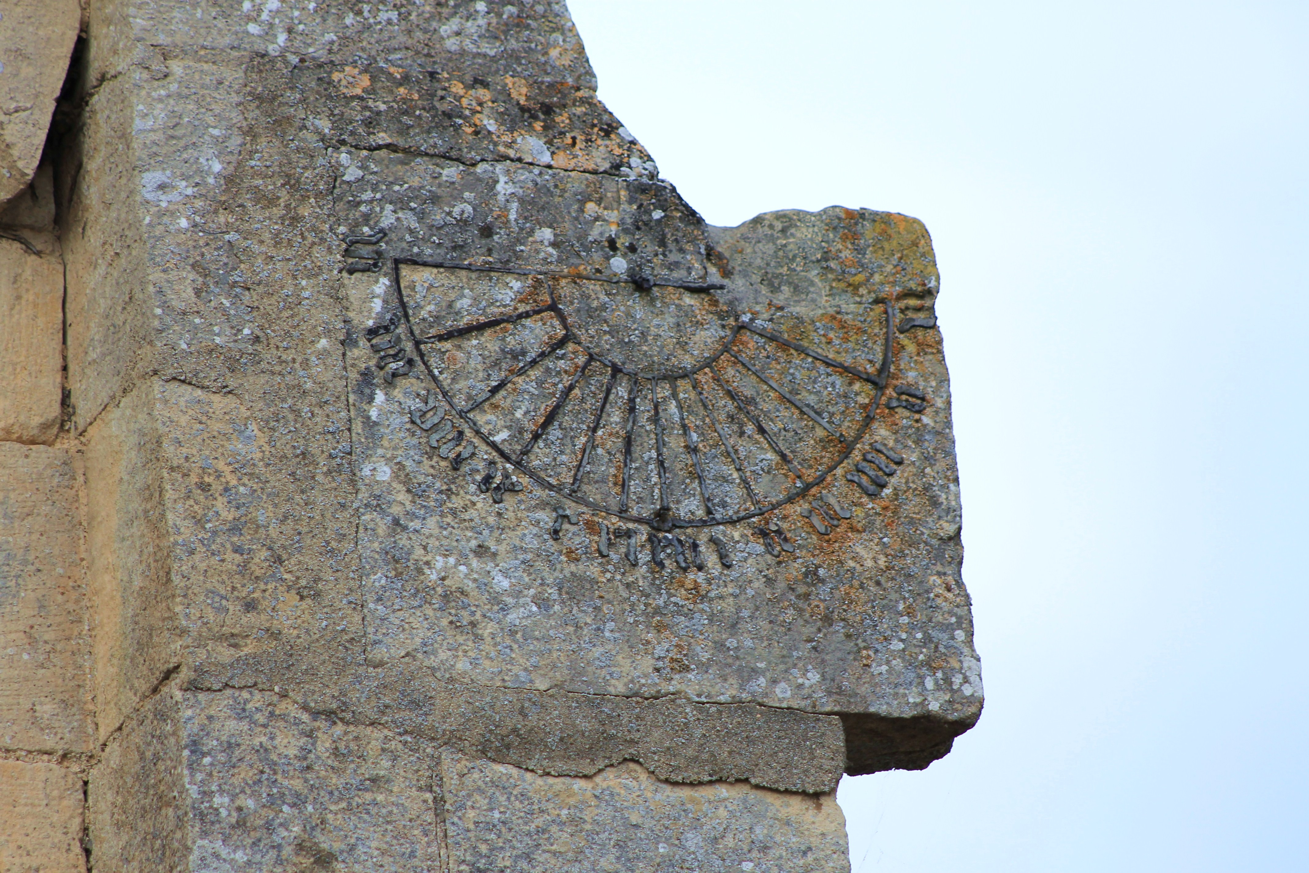 Cadran solaire de l'église Saint-Gervais de Percy-en-Auge (Calvados)